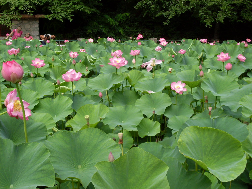 Nuferi termali, Baile Felix, Jud. Bihor